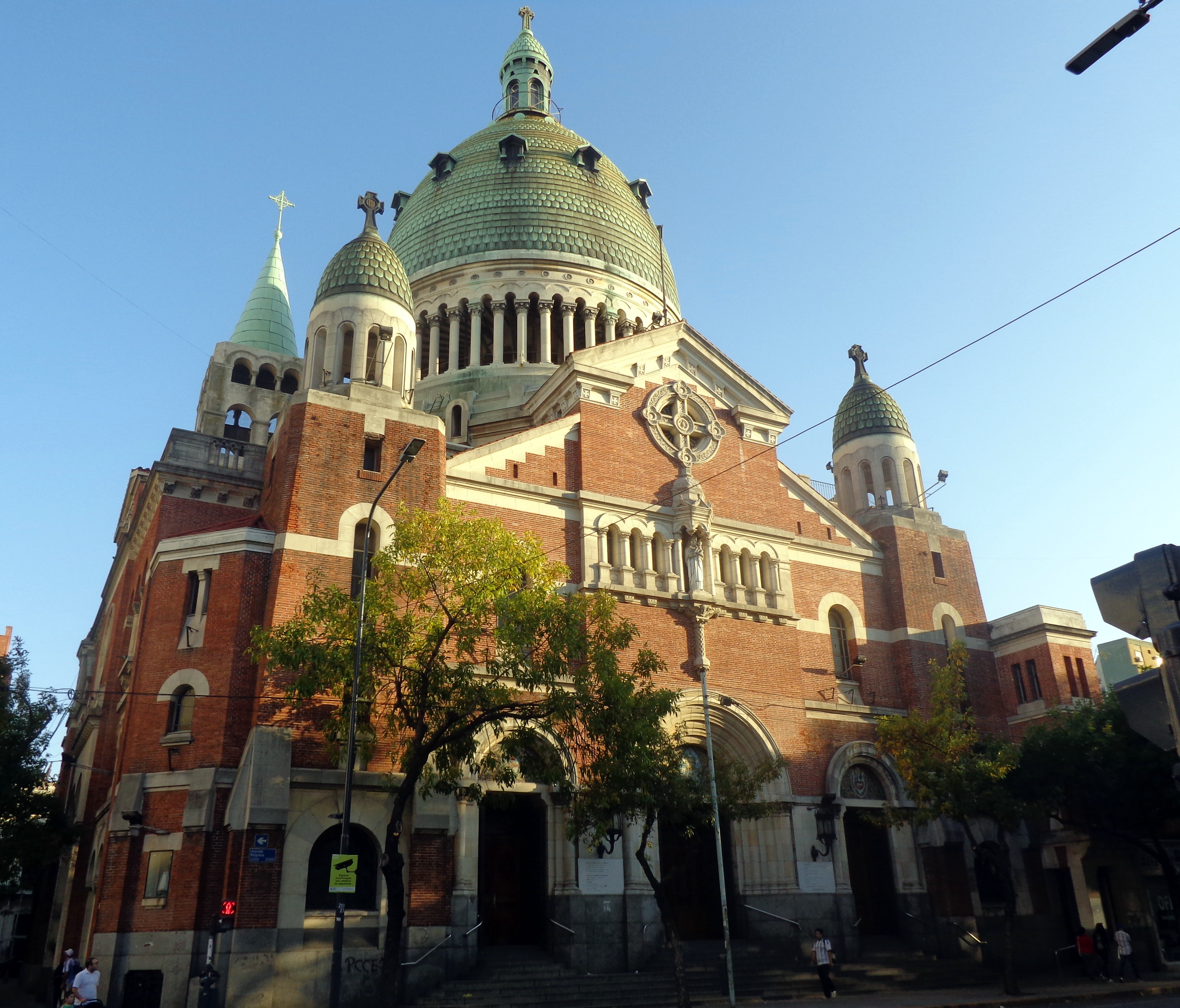 Basílica Santa Rosa de Lima, en Avenida Belgrano, barrio de Balvanera, Buenos Aires, Argentina.